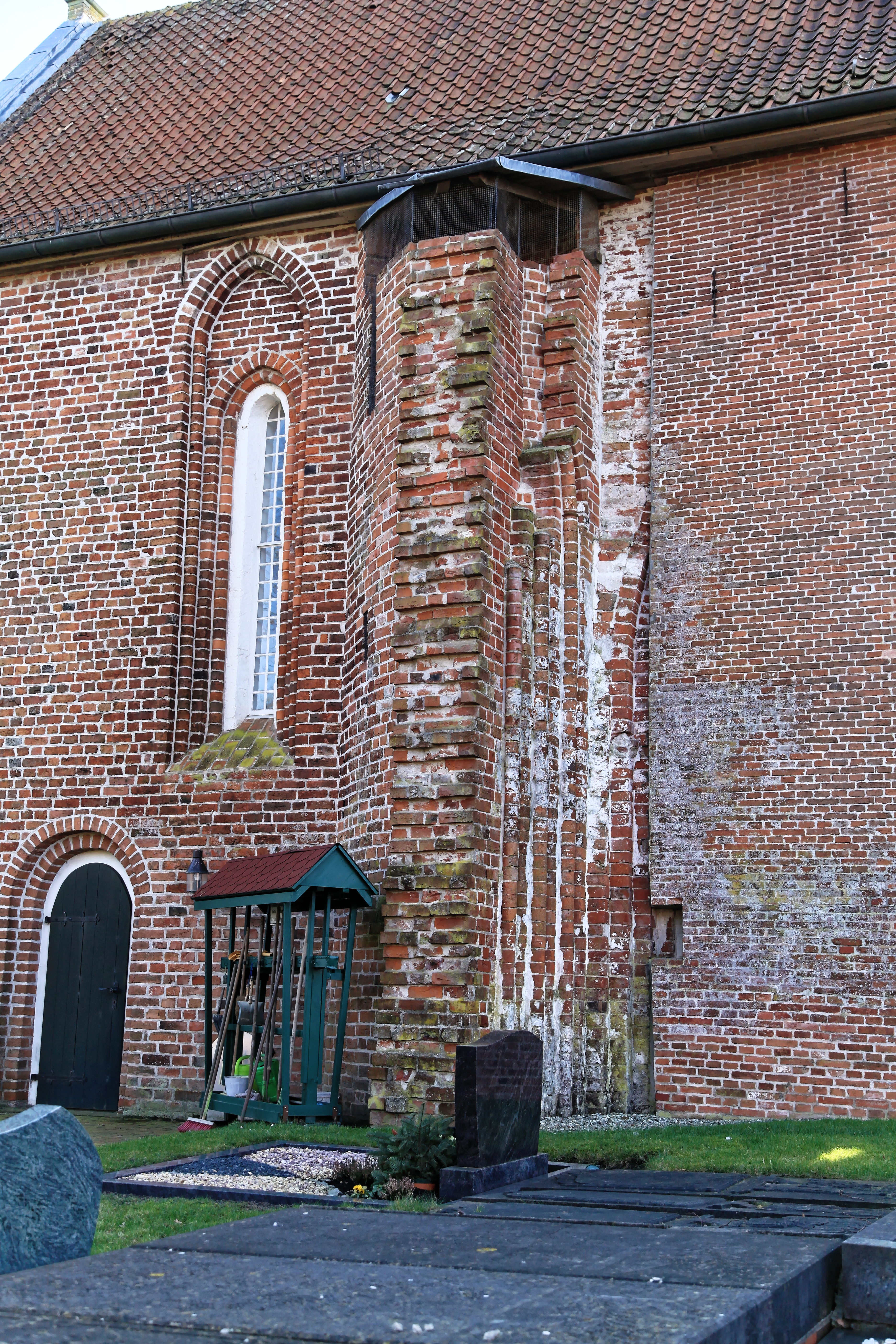 Friedhof und St.-Sebastians-Kirche, Karkgang in Hatzum, Jemgum